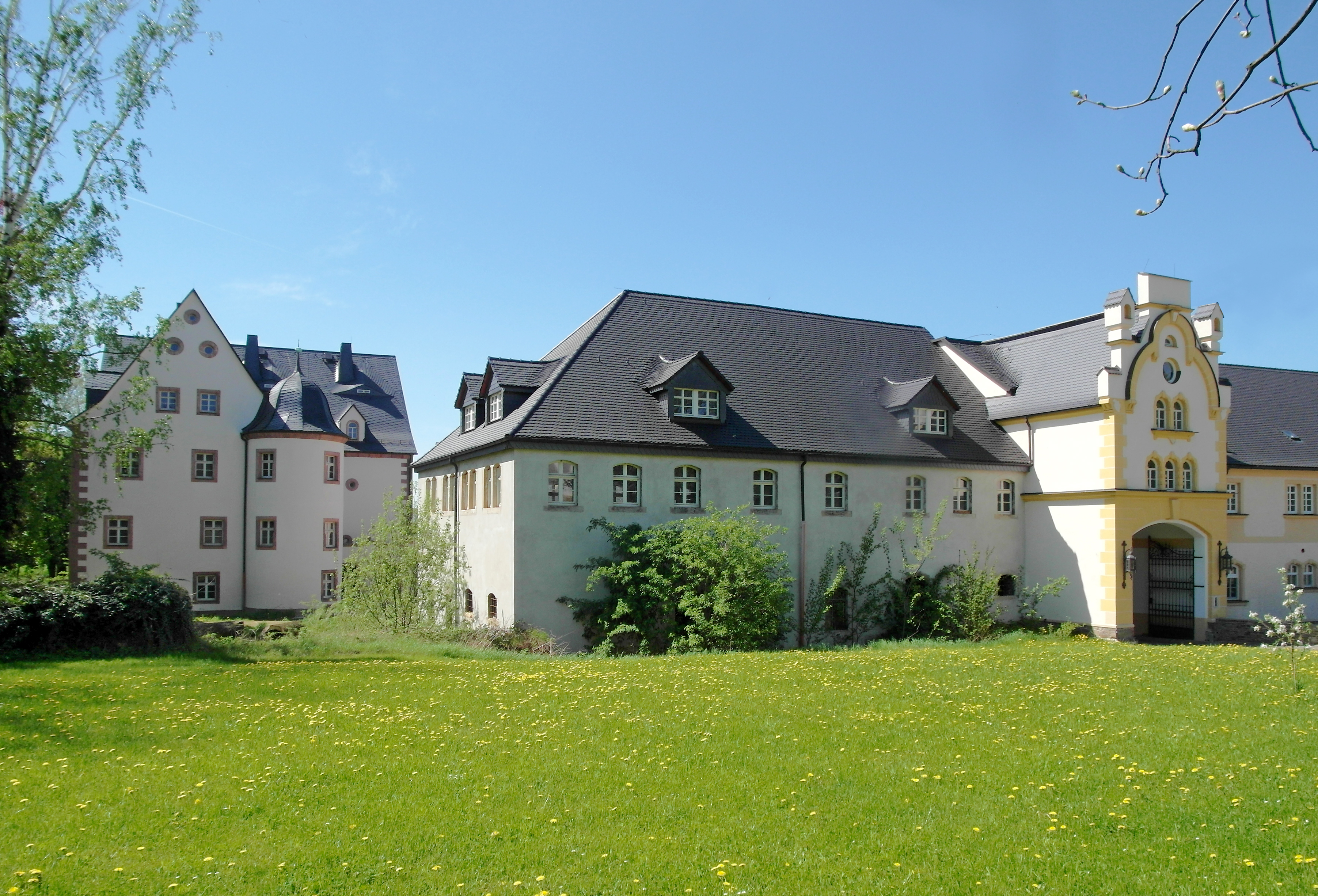 28.04.2018 04668 Cannewitz (Grimma), Alte Dorfstraße: Rittergut (GMP: 51.273496,12.829697). Die Ursprünge des 1551 erstmals verzeichneten Ritterguts gehen bis in das 13. Jahrhundert zurück. Das nach dem Krieg 1946 gegründete Volkseigene Gut (VEG) wurde 1991 wieder aufgelöst. 2005 privatisierte die Treuhand-Nachfolgegesellschaft BWG das ehemalige Rittergut. Sicht aus Nordosten zum Herrenhaus (GMP: 51.273057,12.829983) und Torhaus. [SAM5592.JPG]20180428135DR.JPG(c)Blobelt